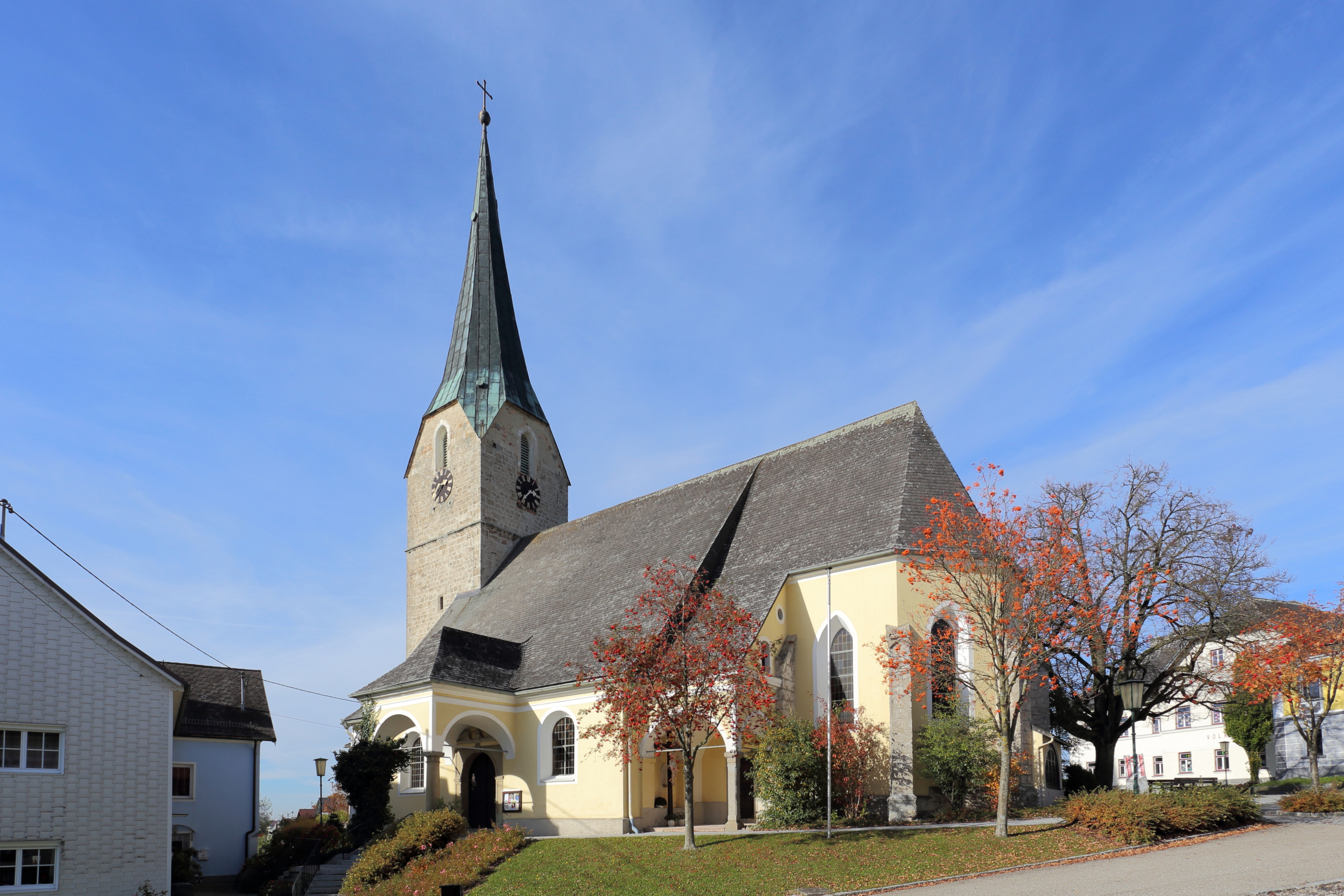 Südostansicht der katholischen Pfarrkirche hl. Dreifaltigkeit in der oberösterreichischen Gemeinde Andrichsfurt. Eine gotische Kirche aus der zweiten Hälfte des 15. Jahrhunderts mit einem einschiffigen, dreijochigen Langhaus und einem zweijochigen Chor. Südseitig wurde in der Mitte des 17. Jahrhundert ein dreijochiges Seitenschiff und Vorbauten auf toskanischen Säulen angebaut.